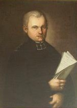 Vojtěch Benedikt Juhn